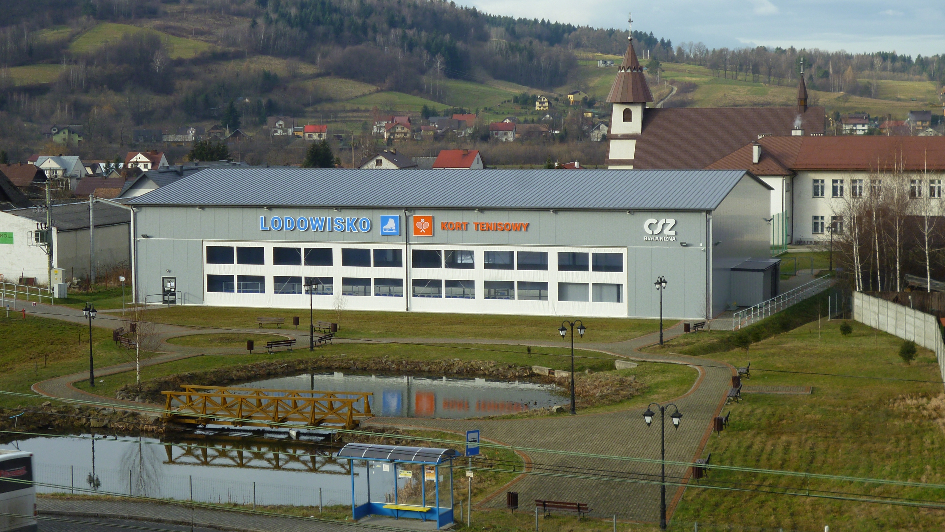 Biała Niżna, kort tenisowy, lodowisko Gminnego Ośrodka Sportu i Rekraacji w Grybowie